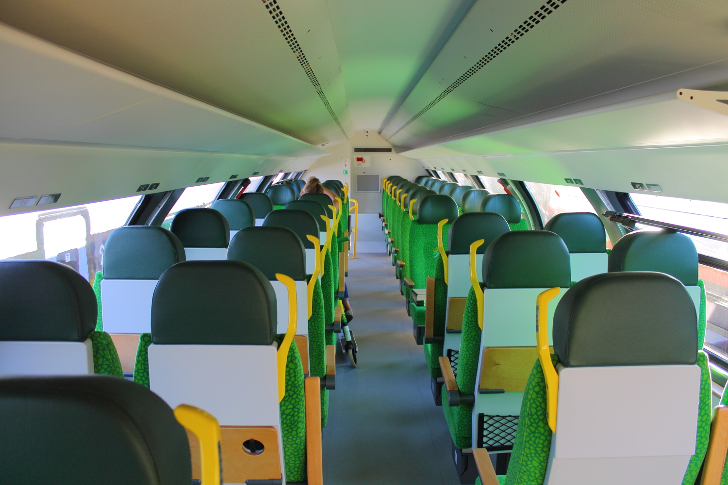 Górny pokład środkowego wagonu piętrowego Pesa Sundeck 416B-002 podczas targów Trako 2015. The making of this document was supported by Wikimedia Polska Association, within Wikigrant no. WG 2015-34.